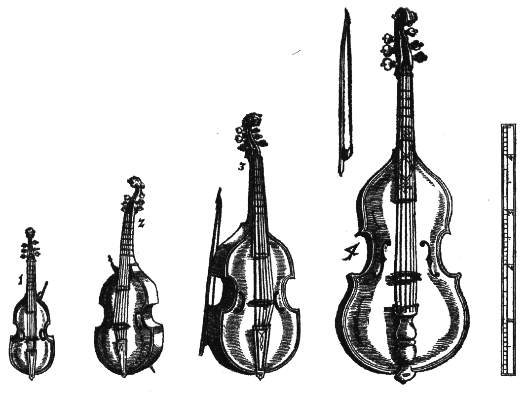 Various Viols